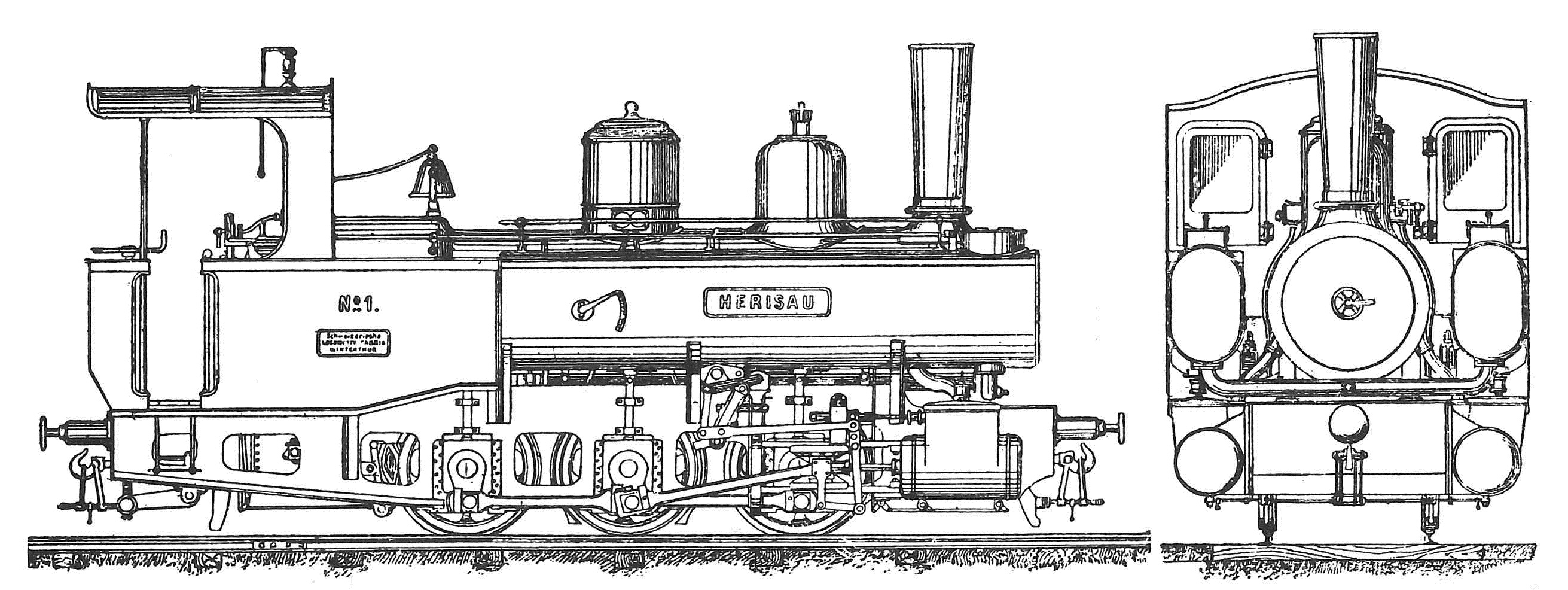 G 3/3 der Appenzeller Bahn (AB), gebaut 1874 von der Schweizerischen Lokomotiv- und Maschinenfabrik WinterthurTypenskizze